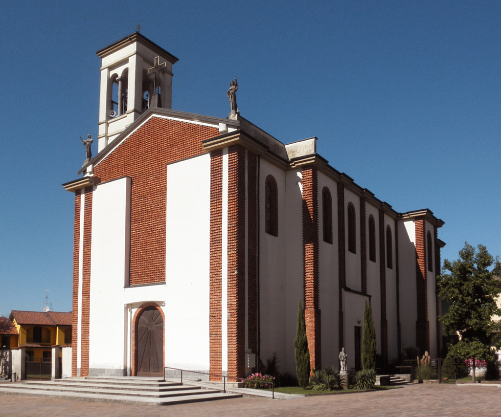 La chiesa parrocchiale di San Leone II a Bargano, fraz. di Villanova del Sillaro